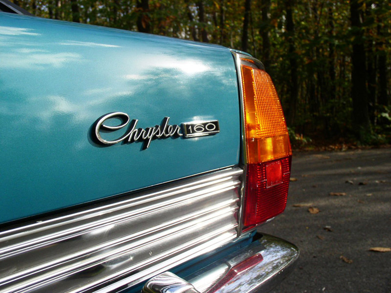 Chrysler_160_monog_AR.jpg